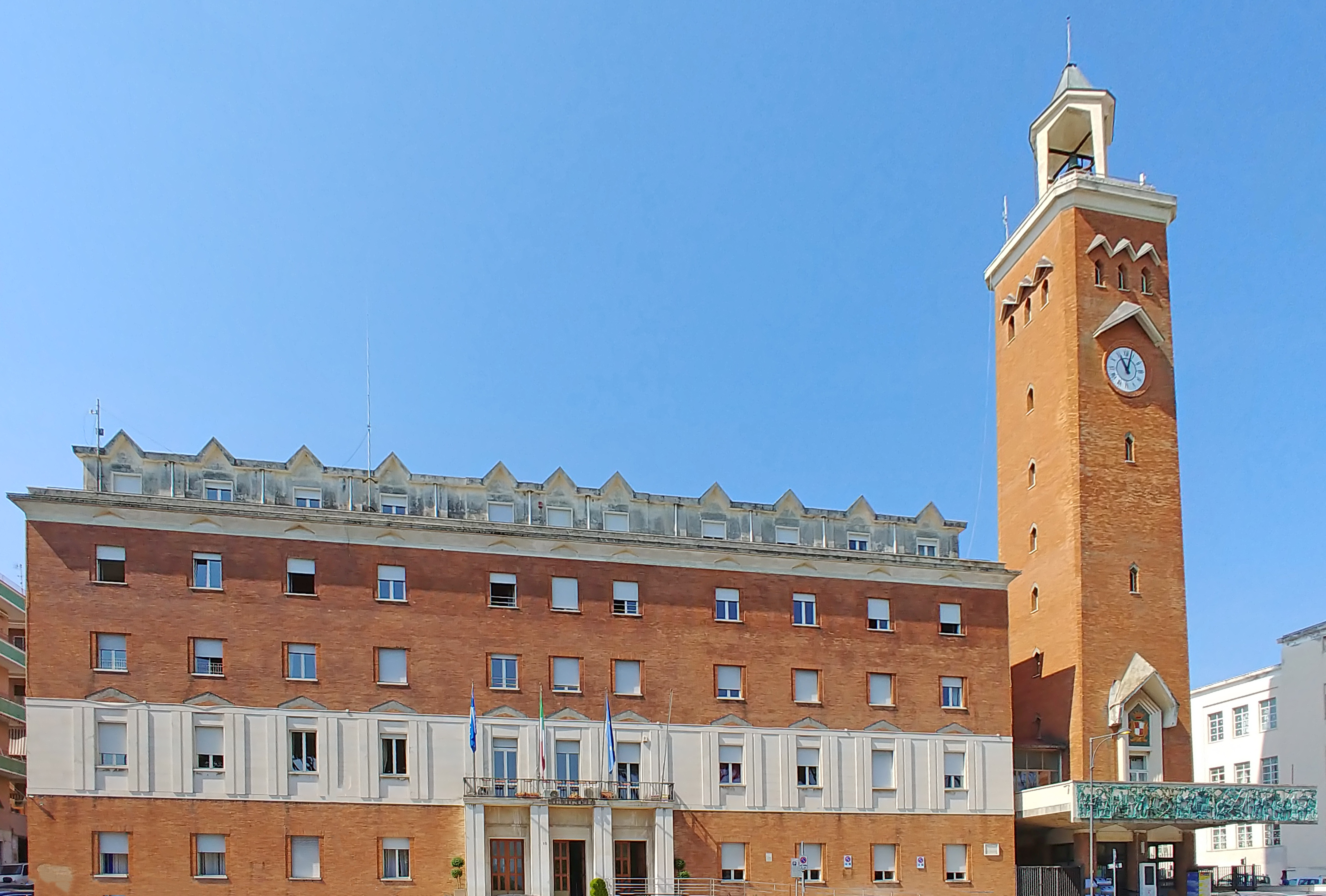 Esterno.